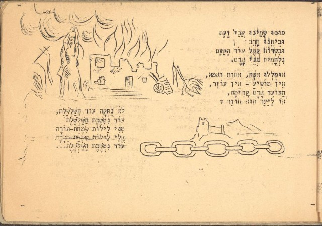 הגדה של פסח, נוצרה על ידי חיילי "היחידה העברית לתעבורה" (י.ע.ל.), של הבריגדה היהודית במצרים בשנת תש"ב 1942, עמ' 19